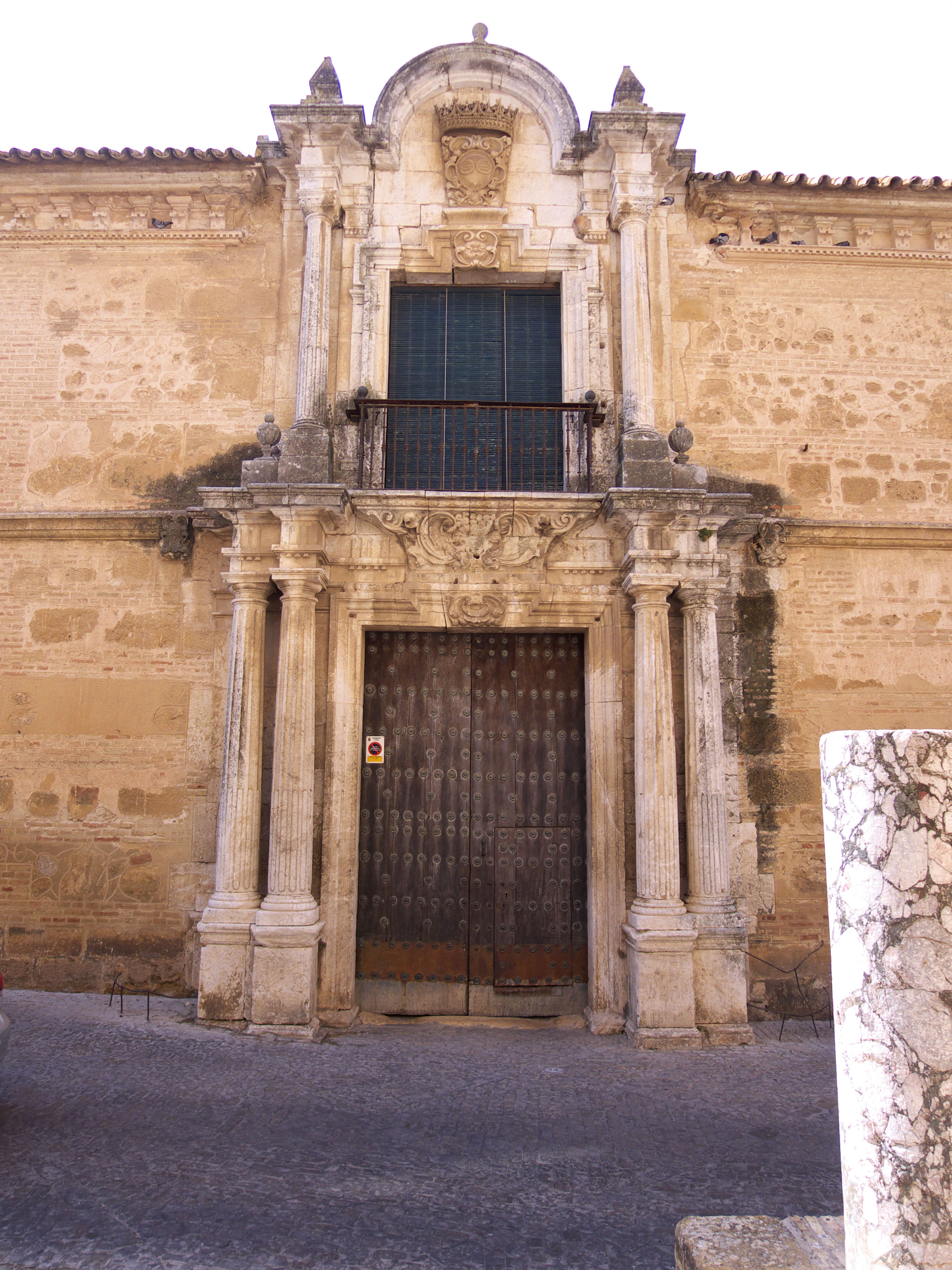 Entre los mejores ejemplares de la arquitectura barroca civil de Carmona (s. XVIII)